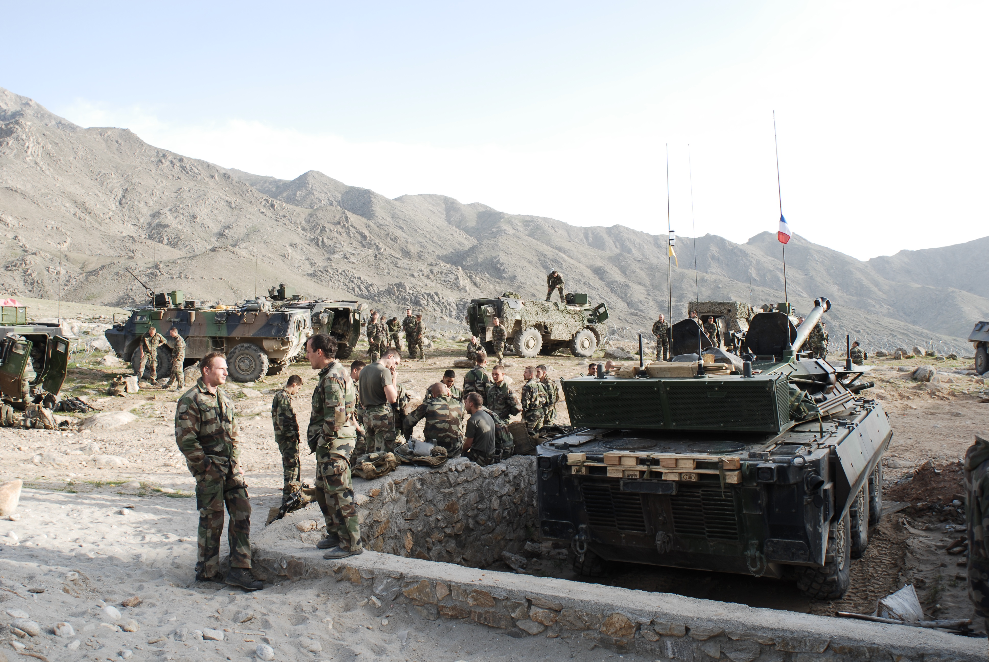 Éléments du Groupement tactique interarmes de Kapisa en 2009 dans la vallée d'Alasei. Un AMX-10RC est au premier plan et des Véhicule de l'Avant Blindé au second.